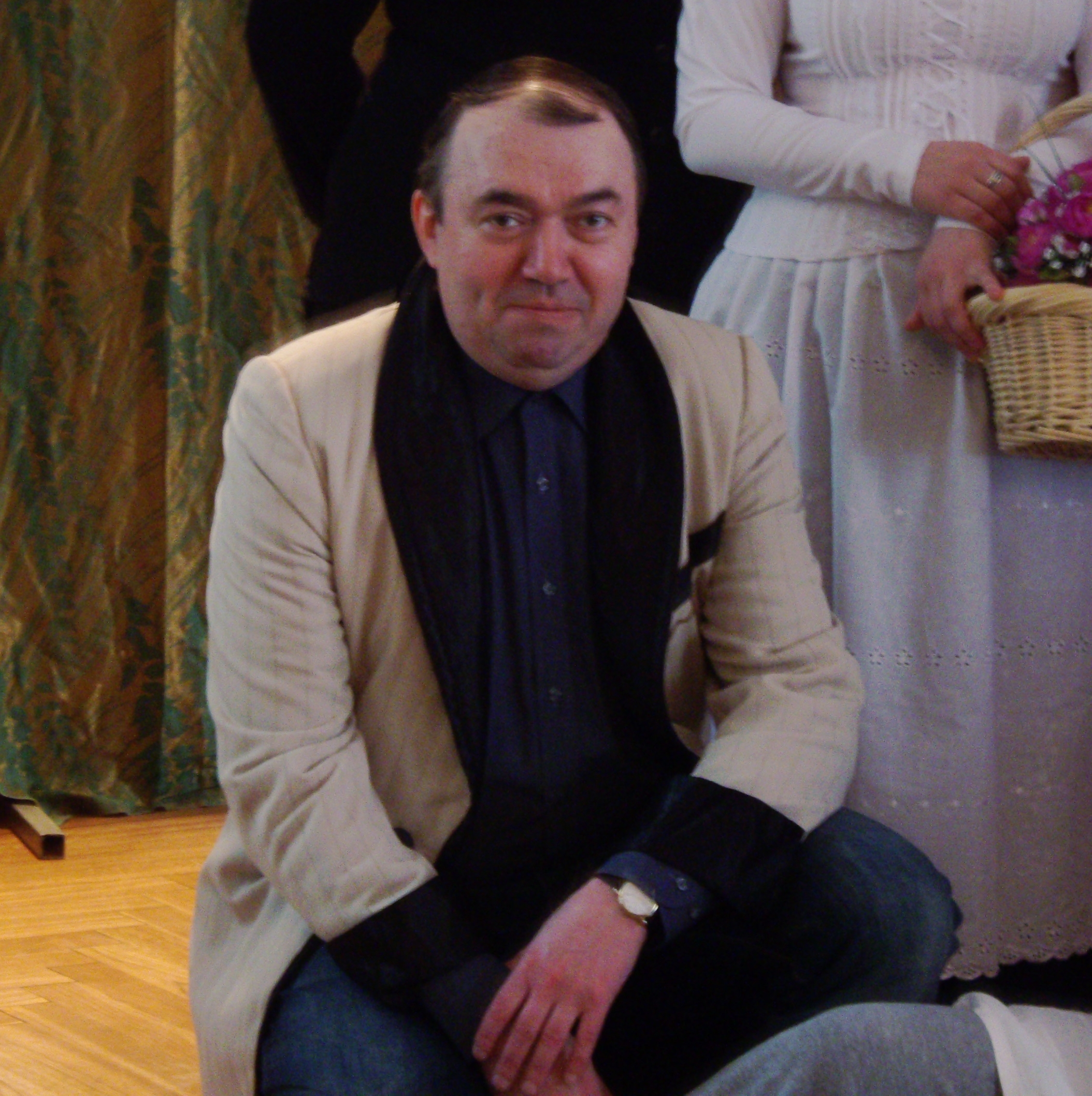 Priidu Beier 1. aprillil 2011 Hugo Treffneri Gümnaasiumis.